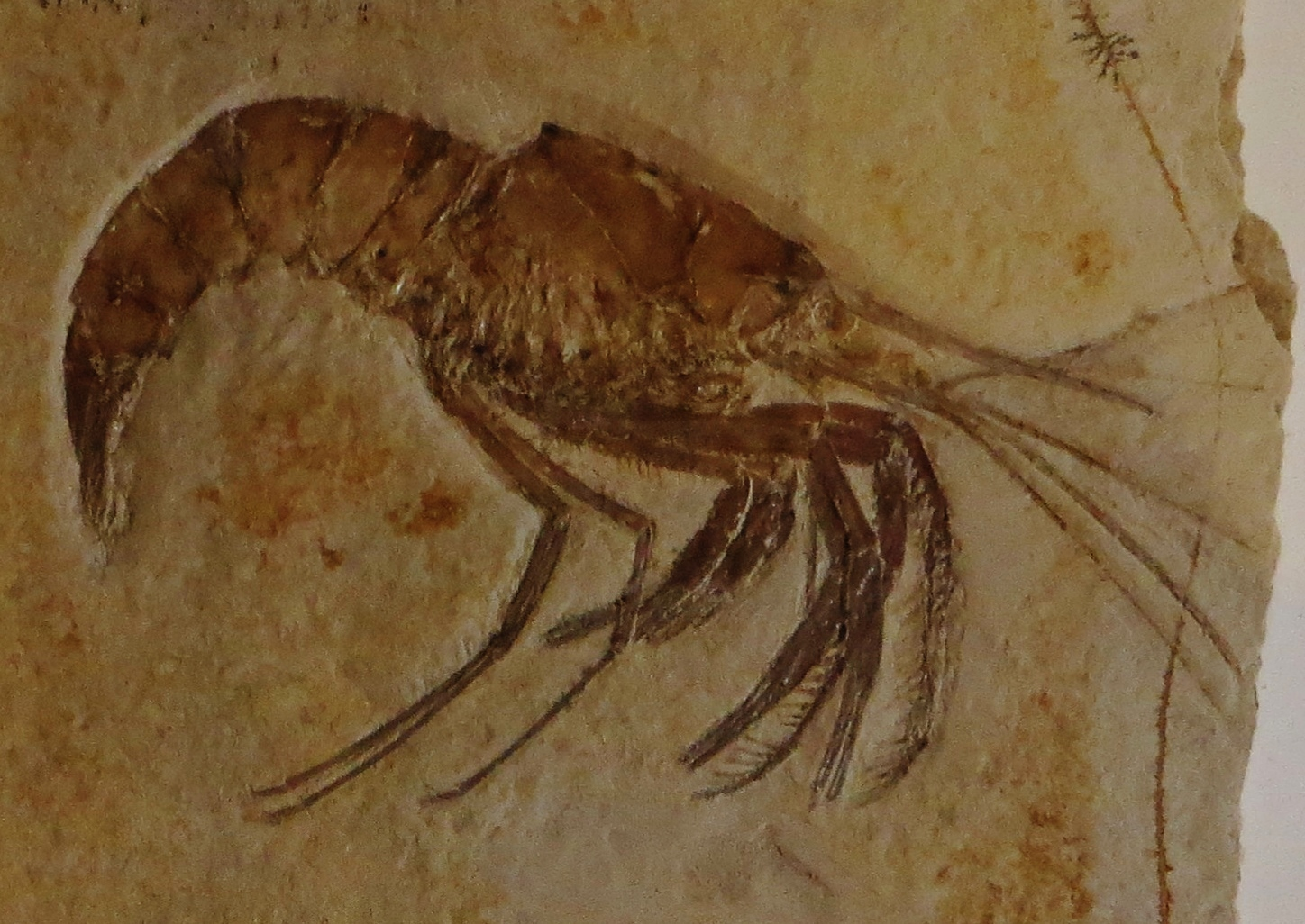 Fossil of Acanthochirana- Took the picture at Teylers Museum, Haarlem